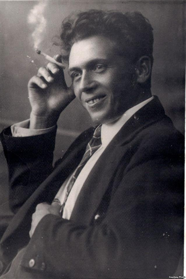 Міхась Чарот. 1930-я гг. З фондаў БДАМЛМ